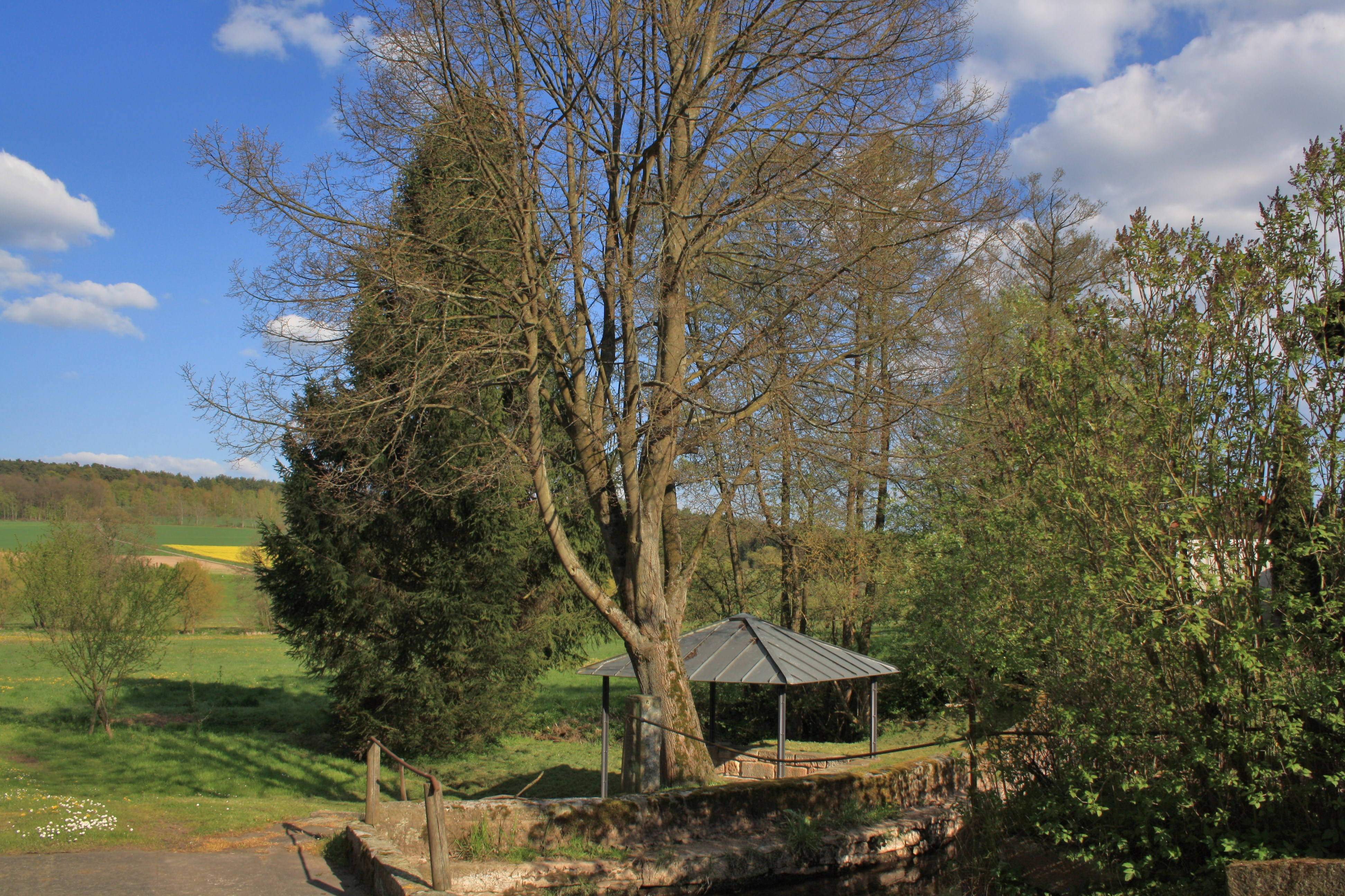 Odillienborn in Döllbach